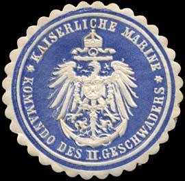 Sealing stamp Title: Kaiserliche Marine - Kommando des II. Geschwaders Description: blau, weiß, geprägt Place: size: 4 cm